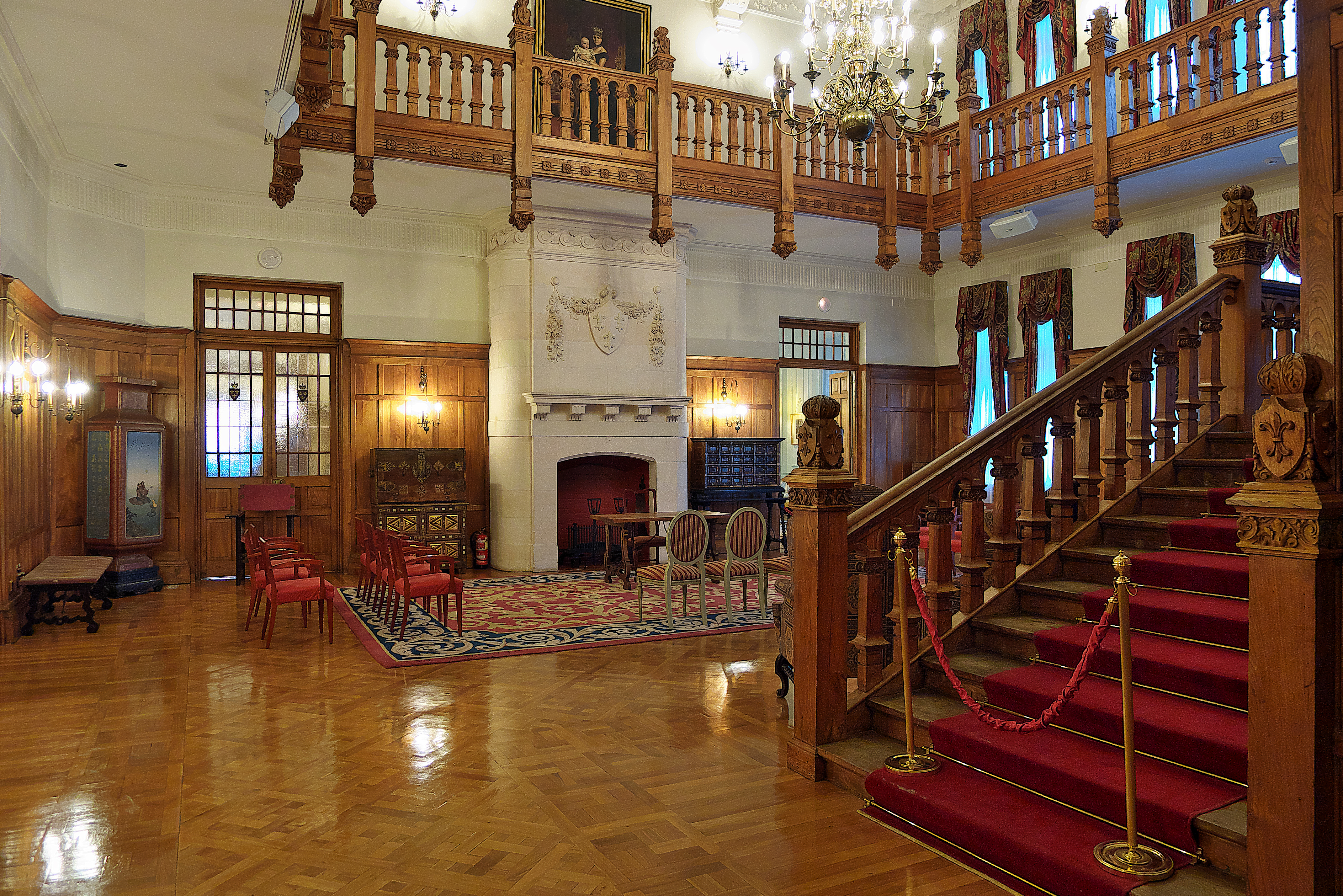 El palacio preferido del rey Alfonso XIII